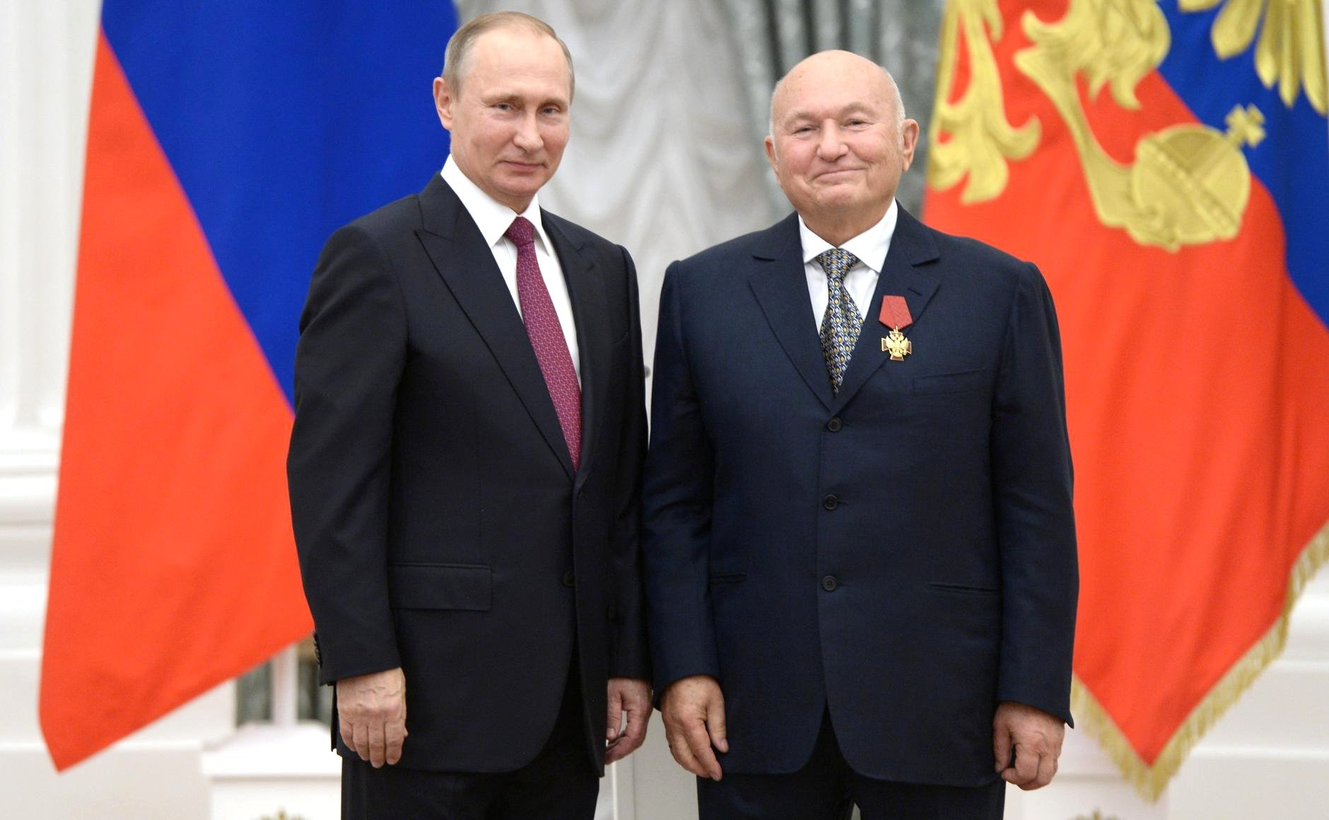 Вручение государственных наград Российской Федерации. Орденом «За заслуги перед Отечеством» IV степени награждён Юрий Лужков